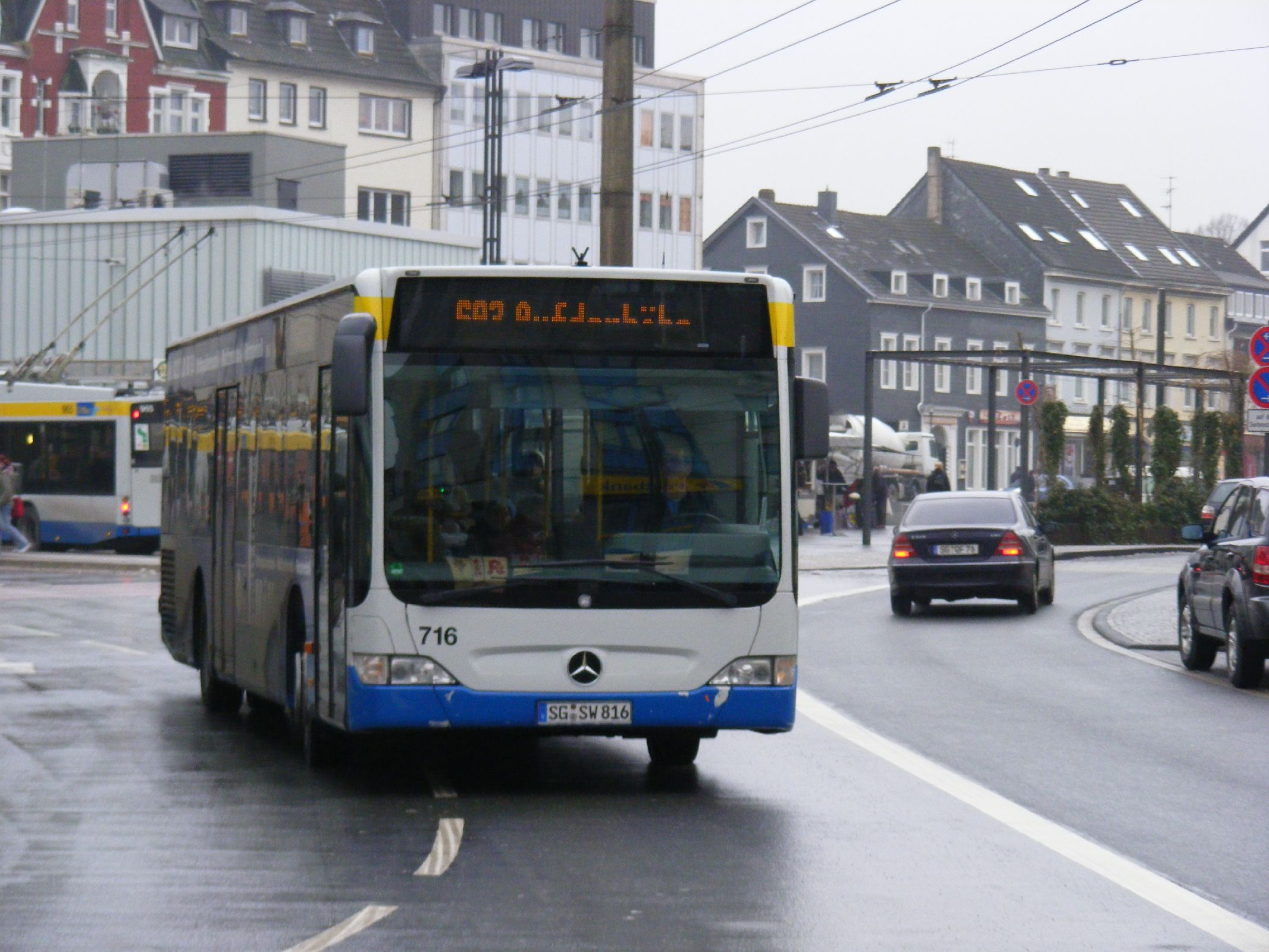 Solingen MB Bus nr 716 Linie 693